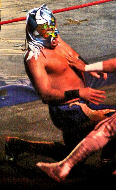 furia